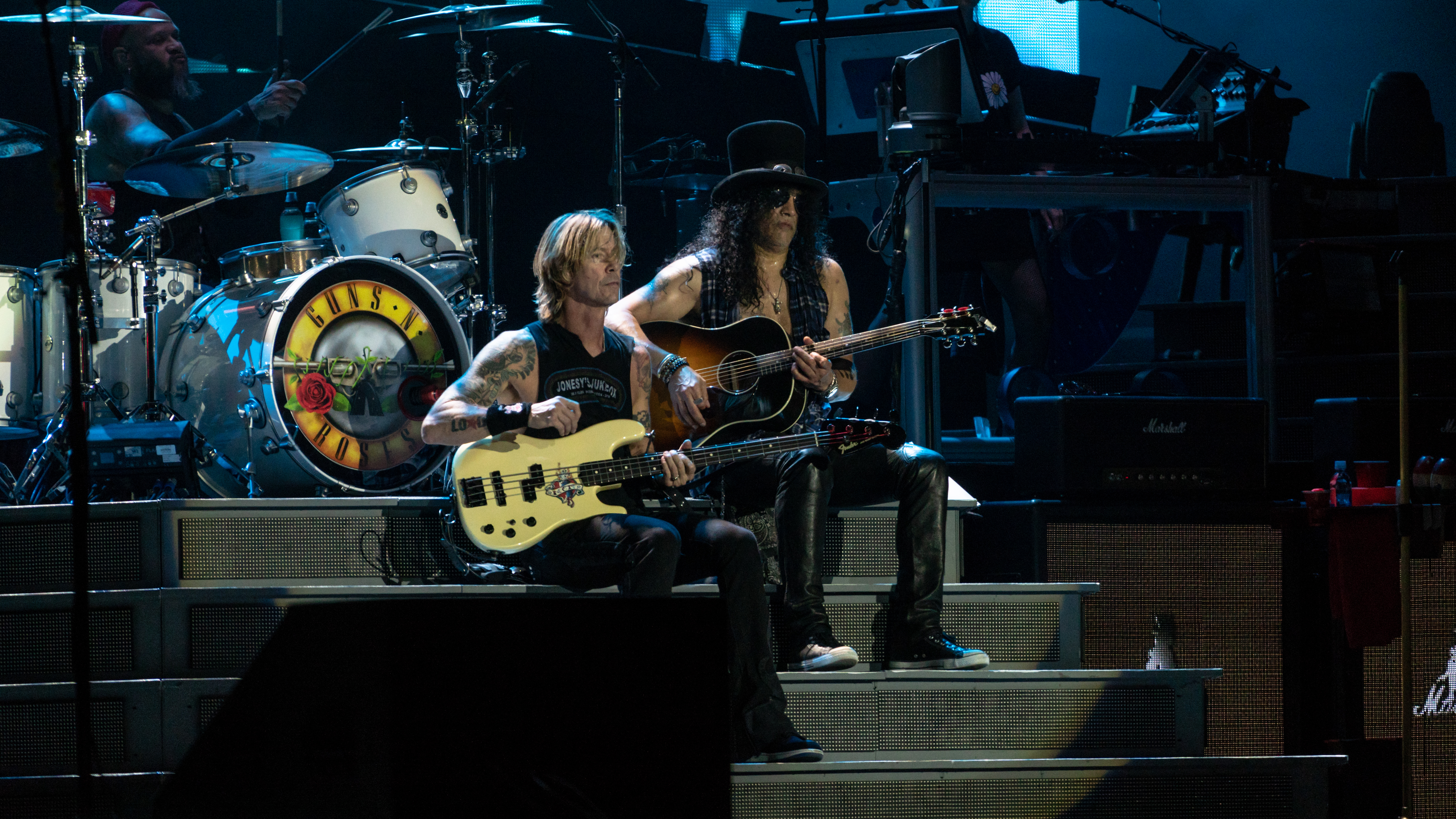 GNRChorzow090718-77